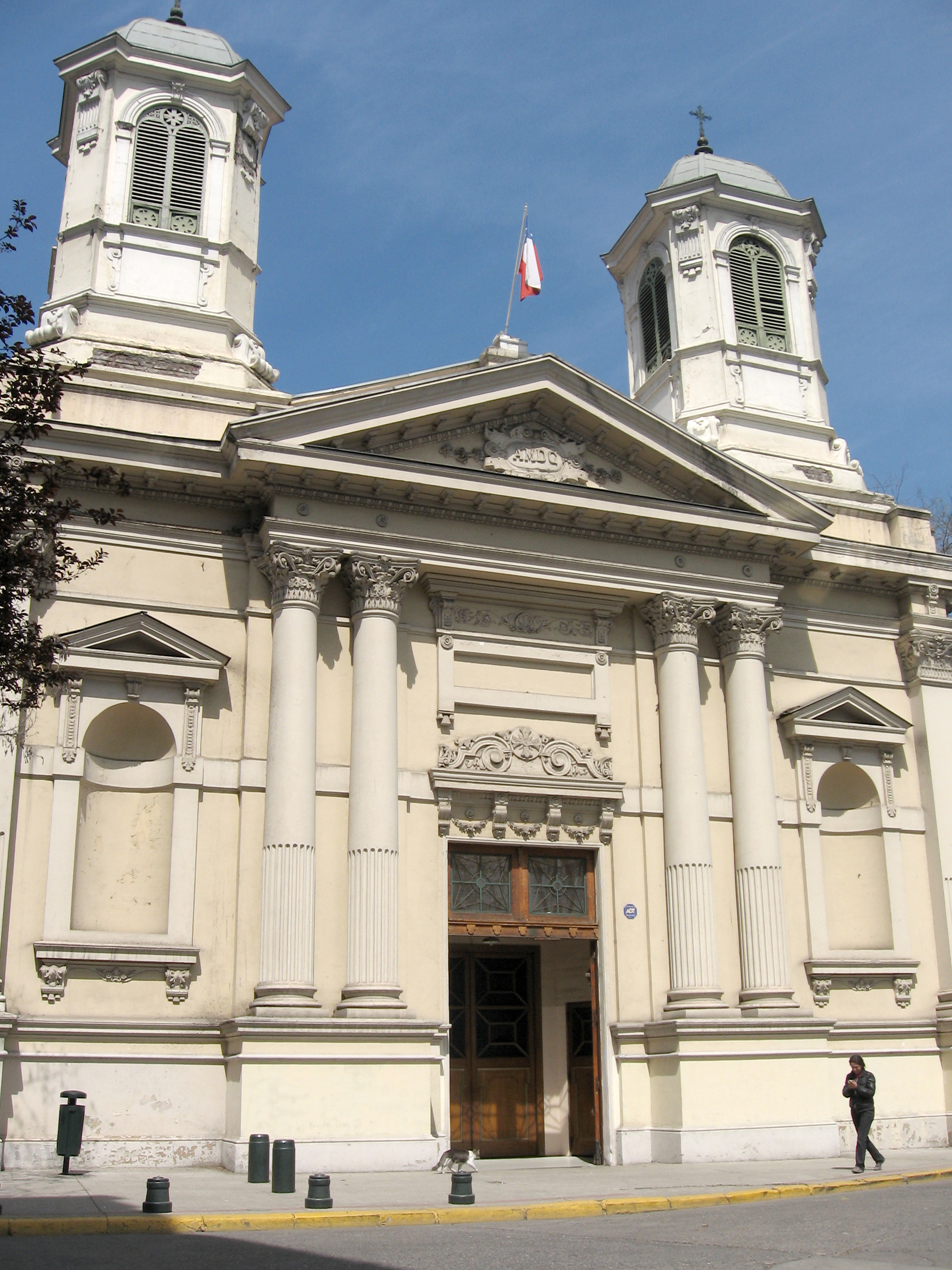 Frontis del Templo parroquial de los santos angeles custodios This is a photo of a national monument in Chile: 873